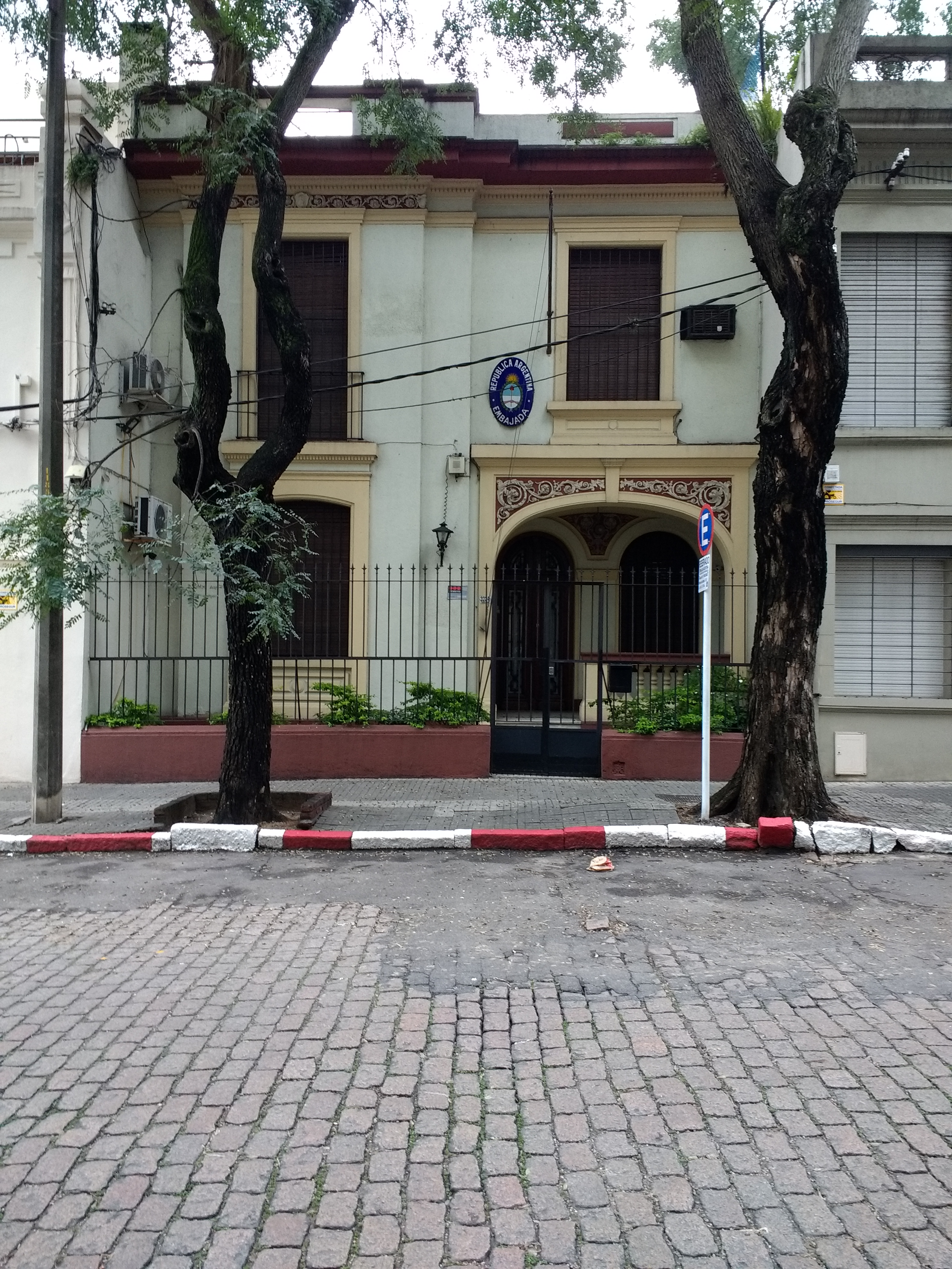 Embajada argentina en Montevideo.